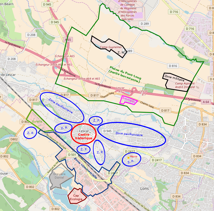 Les zones urbaines de Lescar.